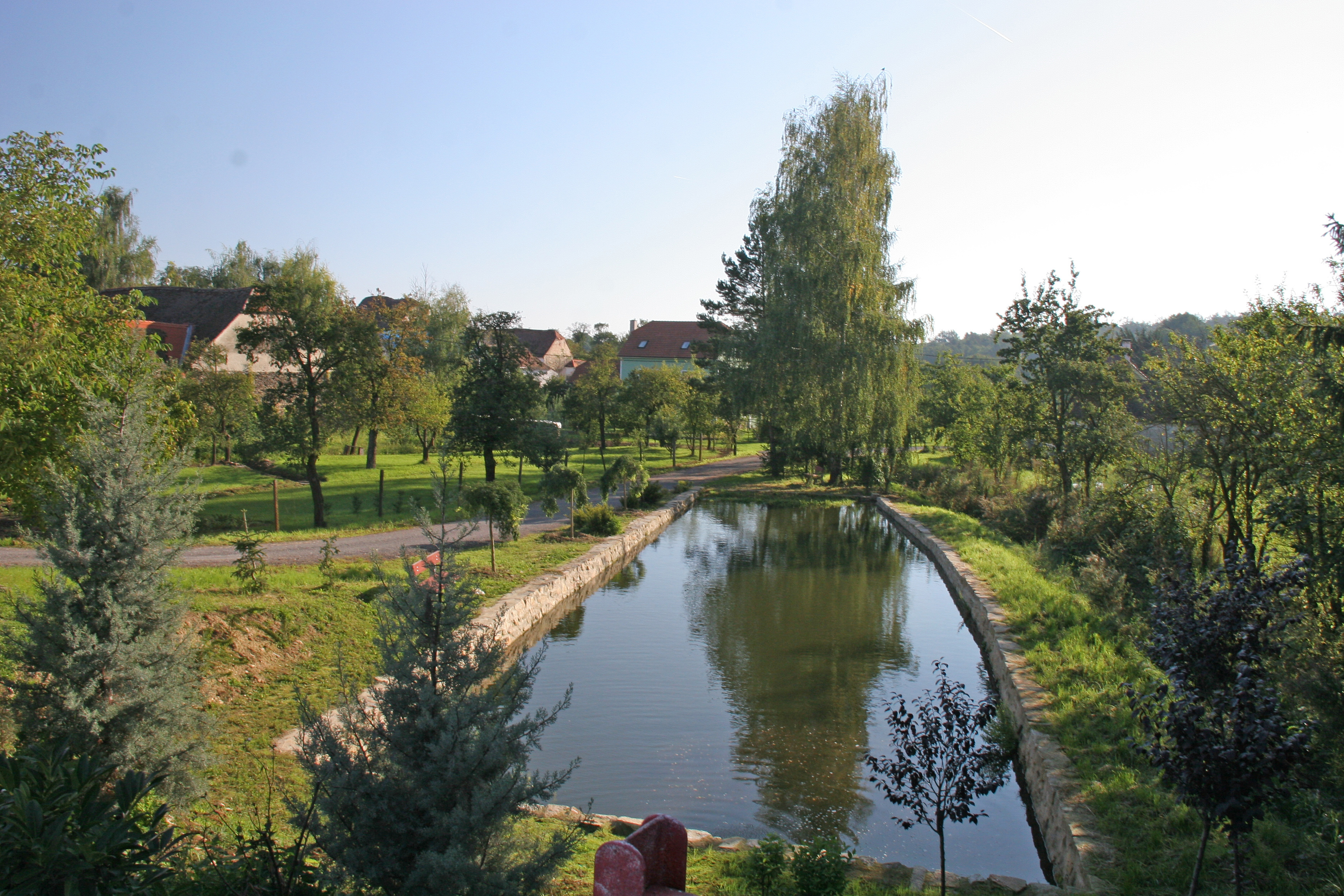 Bezkov návesní nádrž